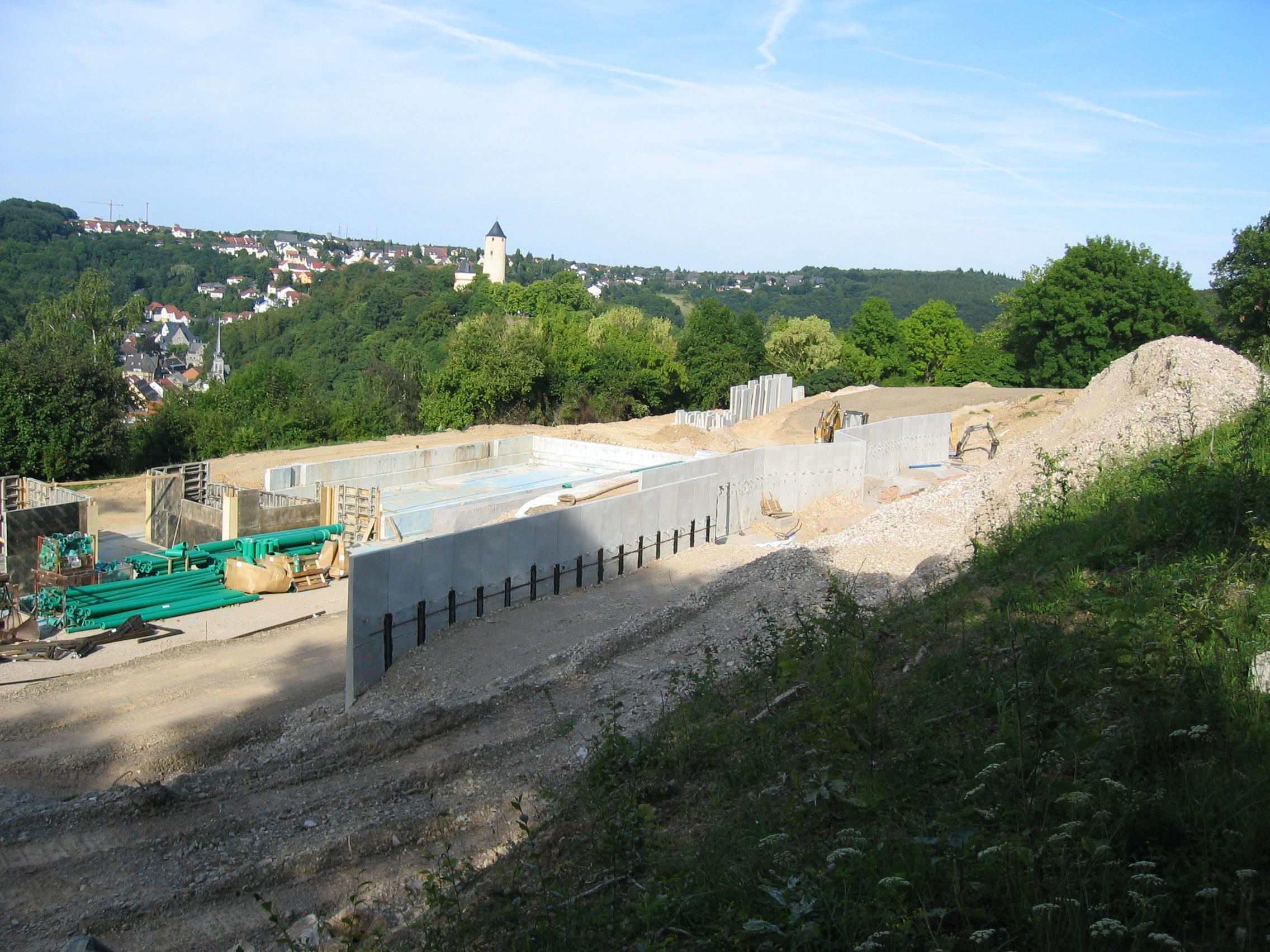 Baustelle Panoramabad Stromberg/Hunsrück Juli 2009, Errichtung von Stützwänden zur Terrassierung des Geländes